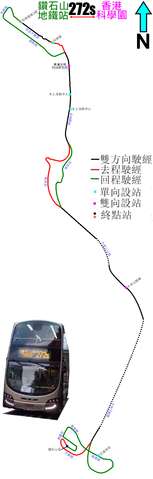 中文（香港）: 九巴272P線的走線圖